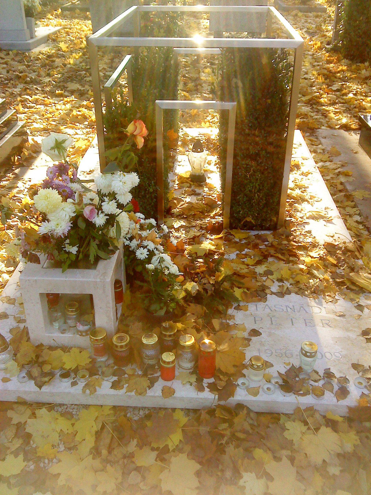 Tasnádi Péter pécsi polgármester sírja